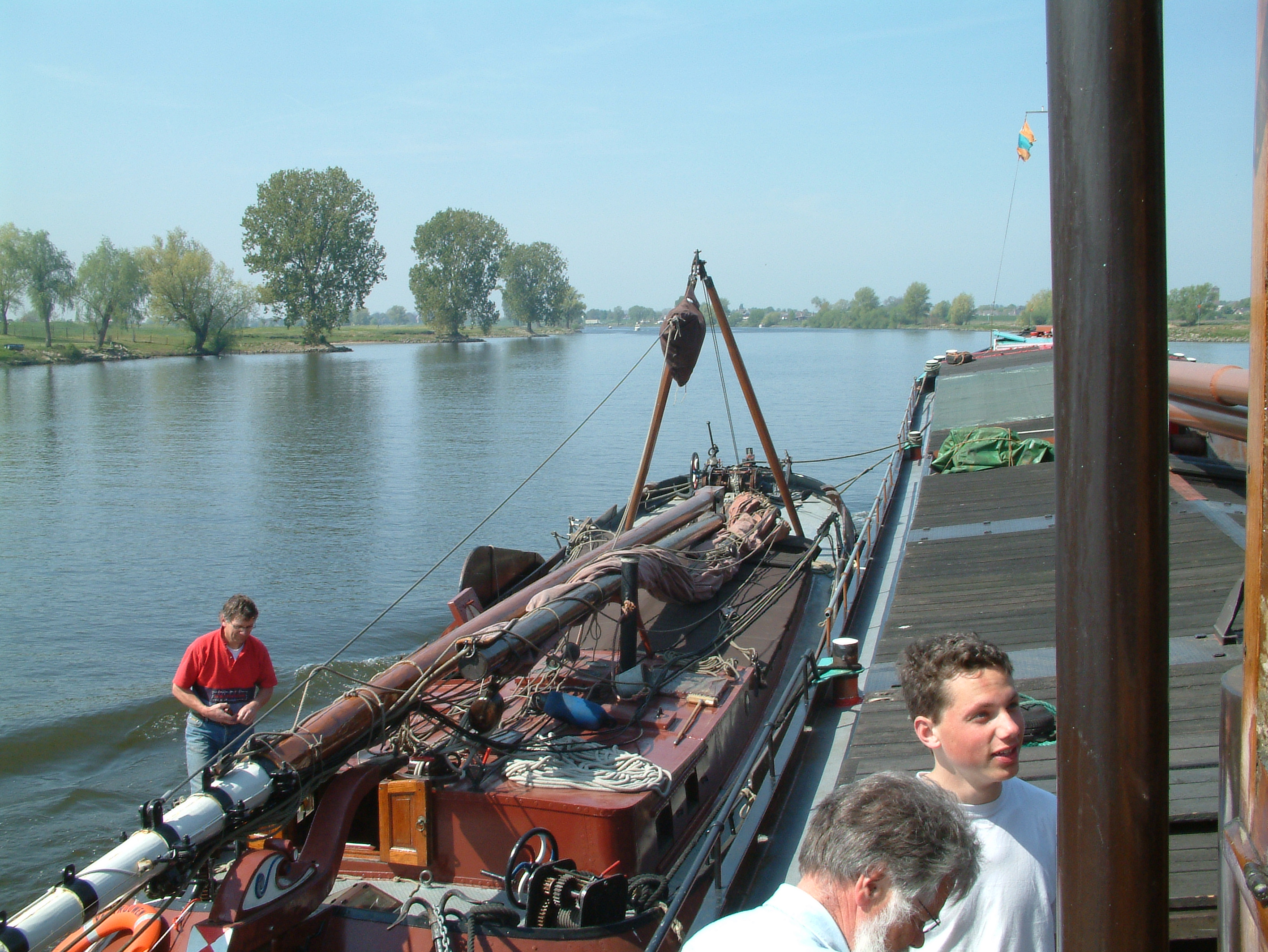 Bokkepoot voor het opzetten en stijken van de mast Categorie:Binnenvaart